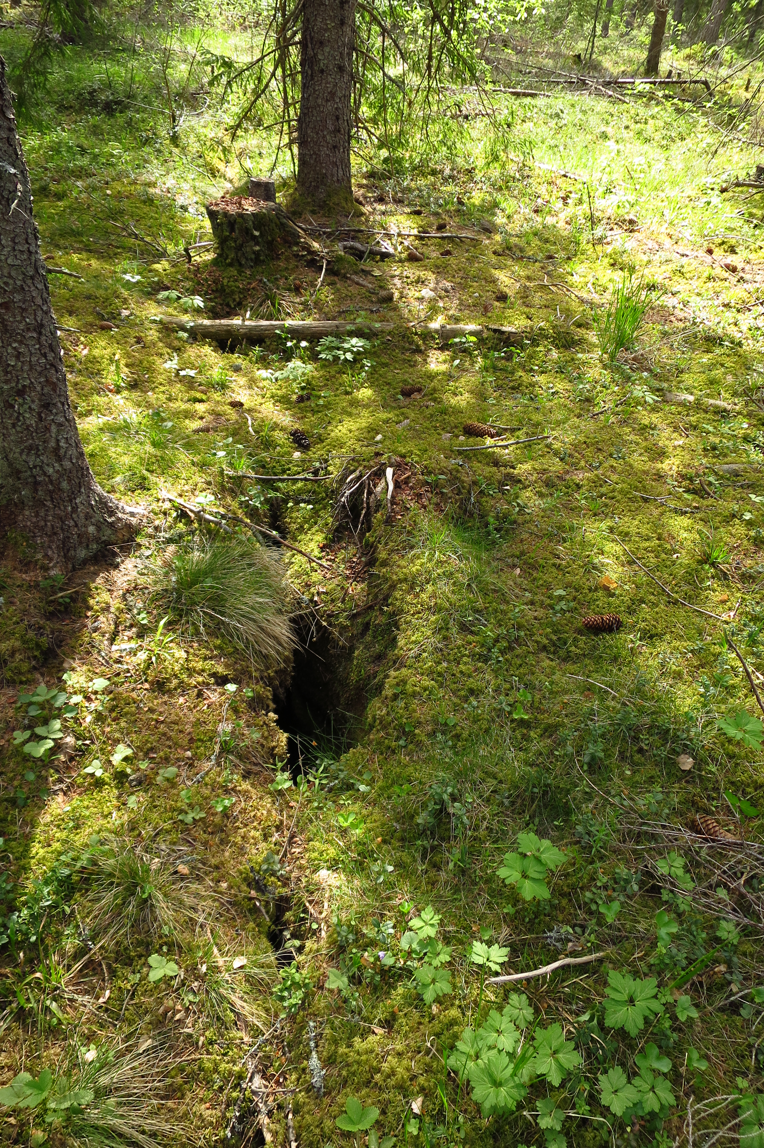 Avalõhe Palamulla karstialal